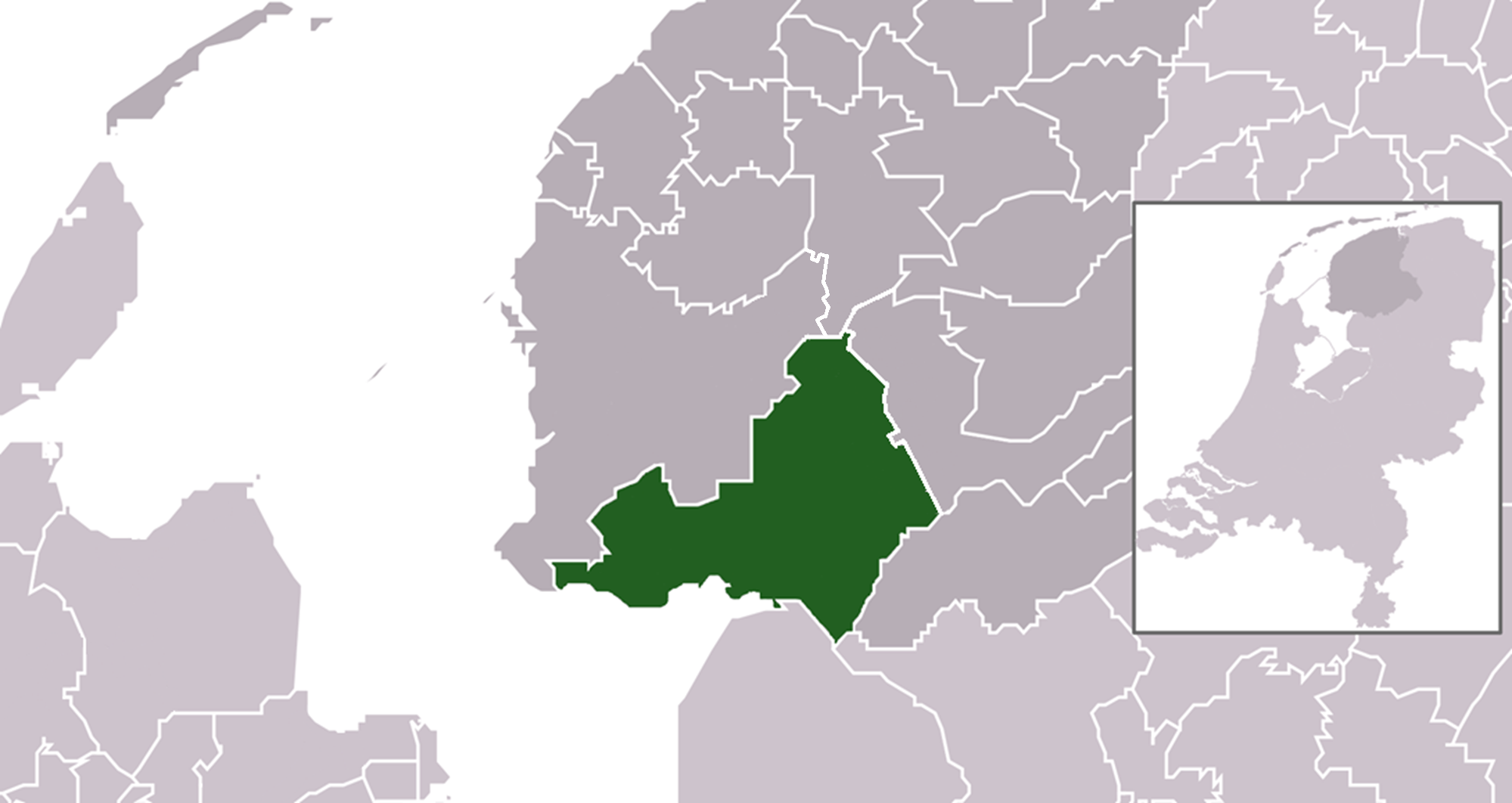 Map van de gemeente De Friese Meren in Friesland (2014-01-01)